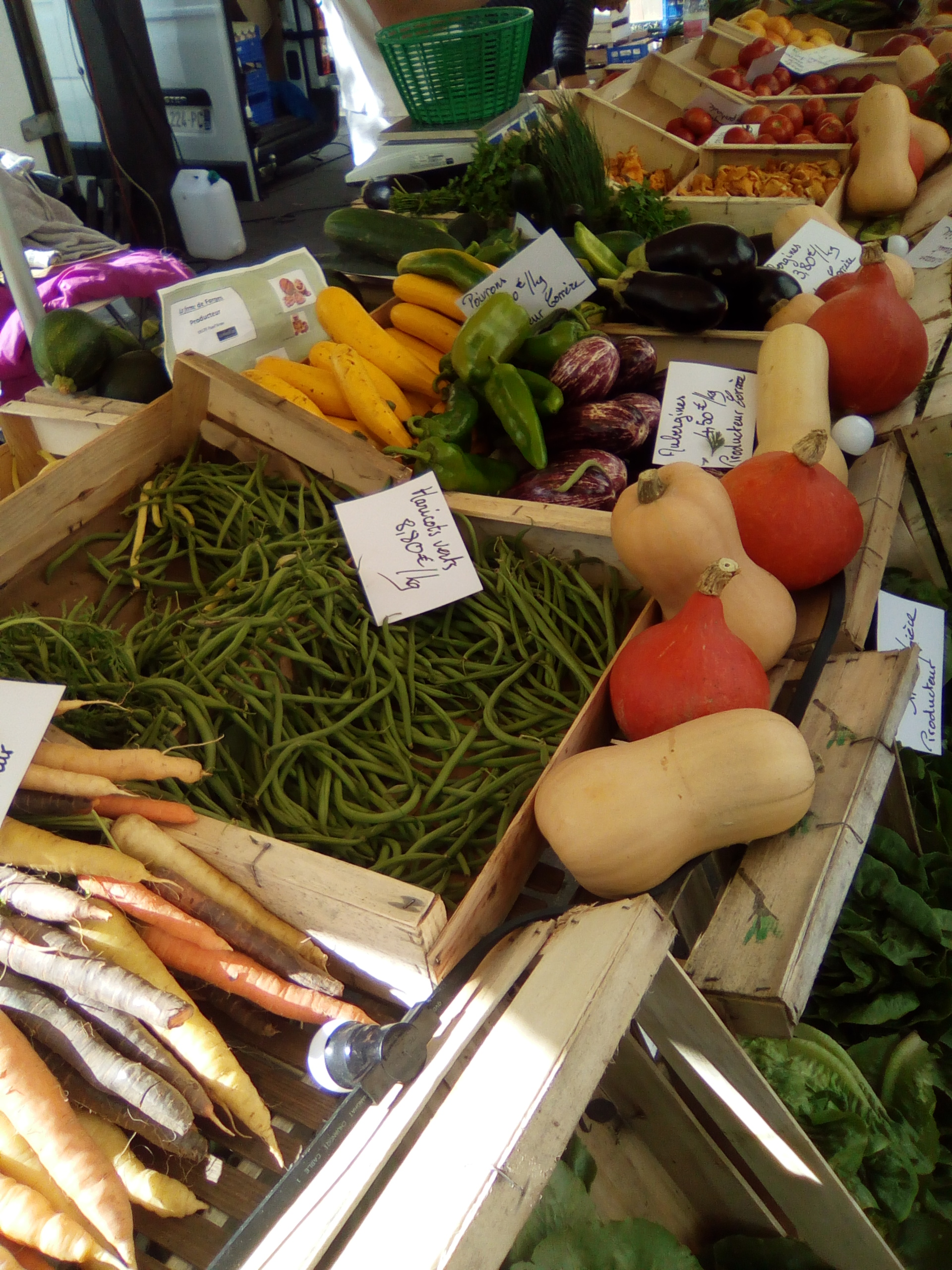 Stand au marché des producteurs de pays, boulevard de Reuilly à Paris.